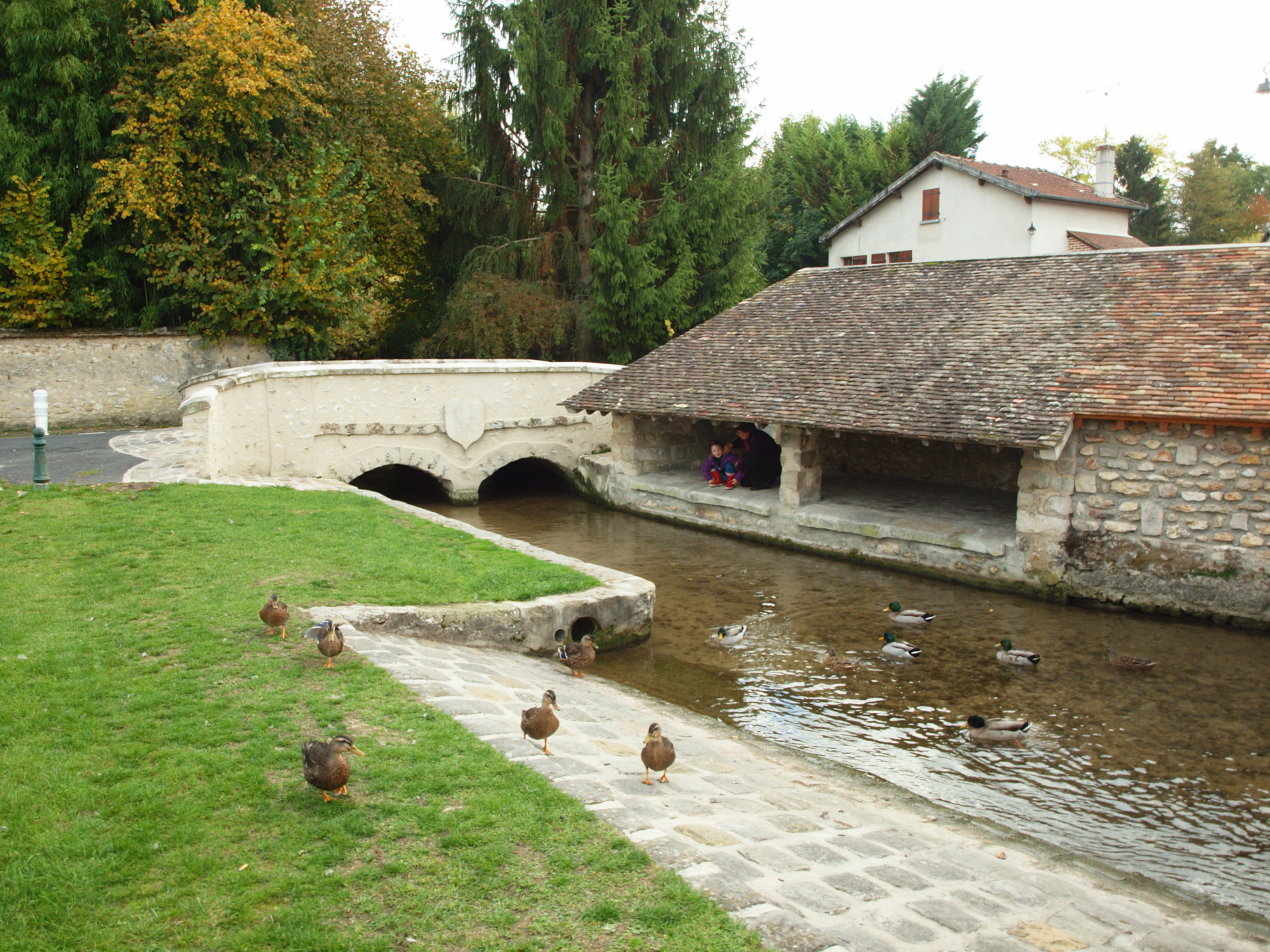 Cély-en-Bière (Seine-et-Marne, France)